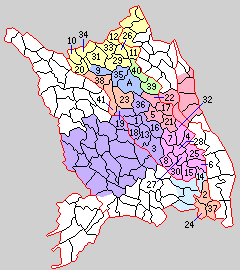 南埼玉郡の町村。